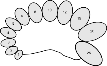 schemat przedstawiajacy orchidometr.